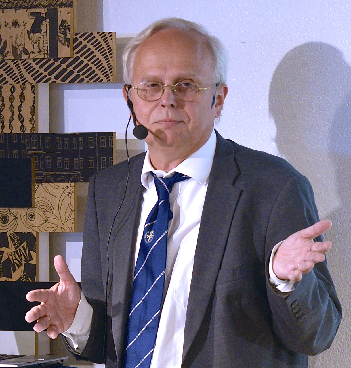 Per-Arne Bodin, forskare vid Slaviska institutionen, föreläser om Ukraina på Kulturhuset Stadsteatern i Stockholm den 13 september 2014.